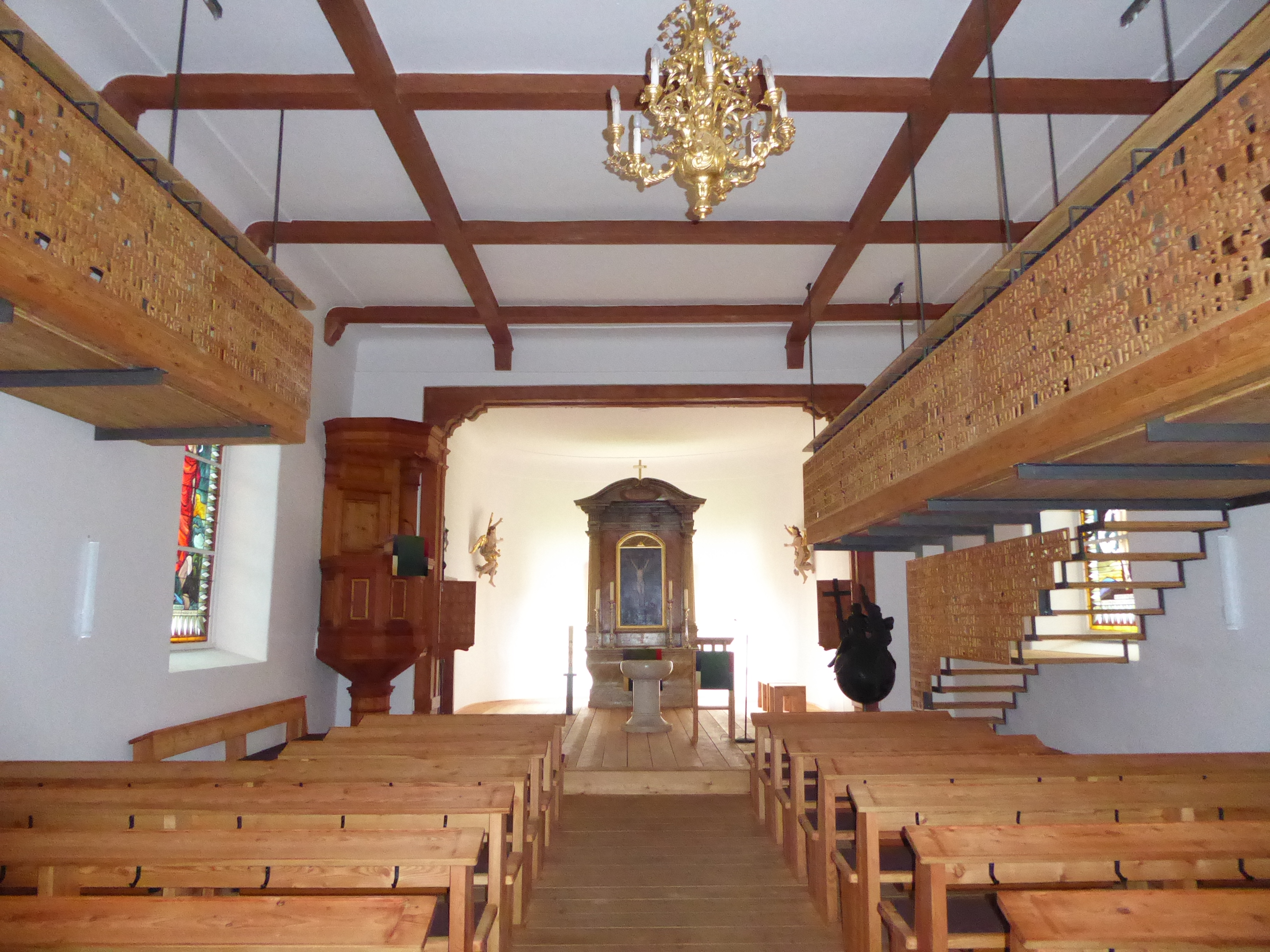 Evang. Pfarrkirche A.B. Mitterbach am Erlaufsee, Niederösterreich (nach der Restaurierung 2016) Dieses Bild wurde anlässlich des österreichischen Tags des Denkmals 2018 in Niederösterreich eingereicht.